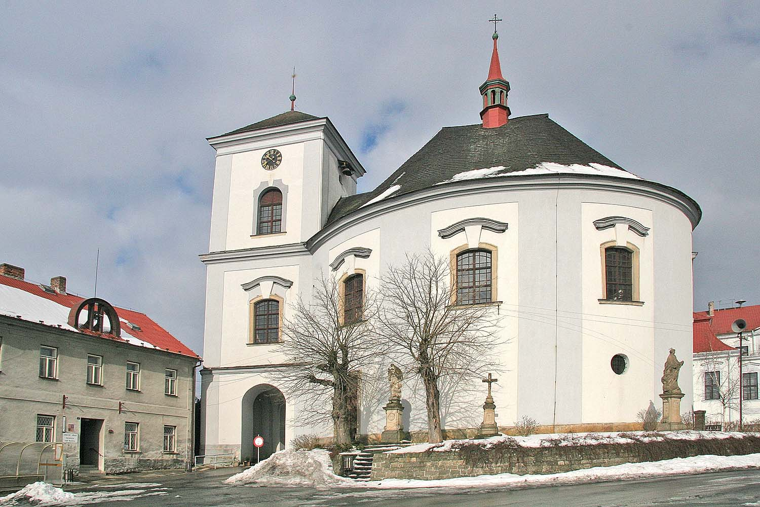 Kostel Zvěstování Panny Marie v Cerekvici nad Bystřicí, district Jičín ator: Prazak date: 20. 2. 2006 Related images